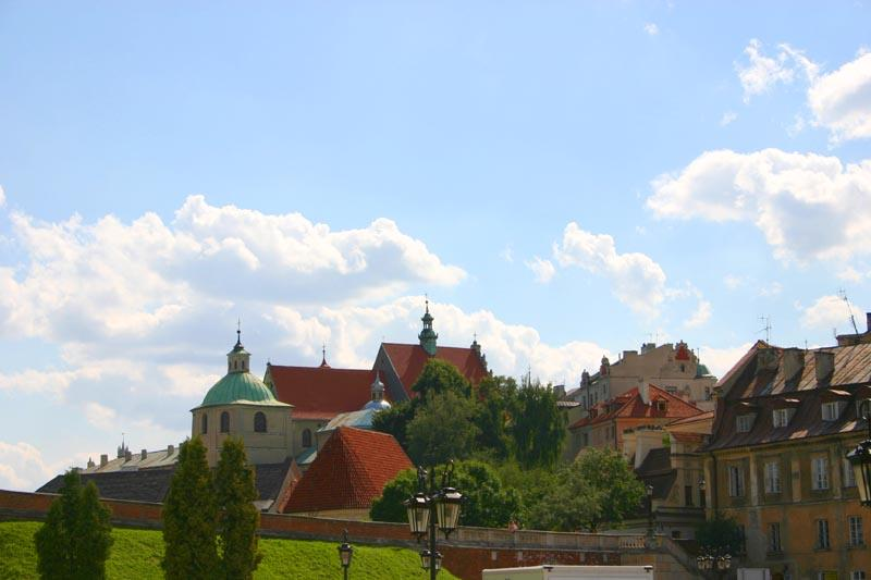 Widok z placu Zamkowego. Kościół Dominikanów widziany z placu Zamkowego. Bazylika Relikwii Krzyża Świętego pw. św. Stanisława, widok z placu Zamkowego.